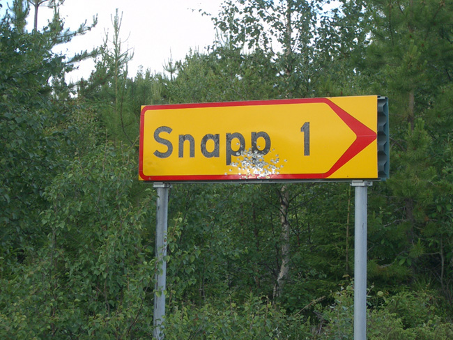 Vägskylt som visar vägen till Snapp i nordvästra Skellefteå kommun.